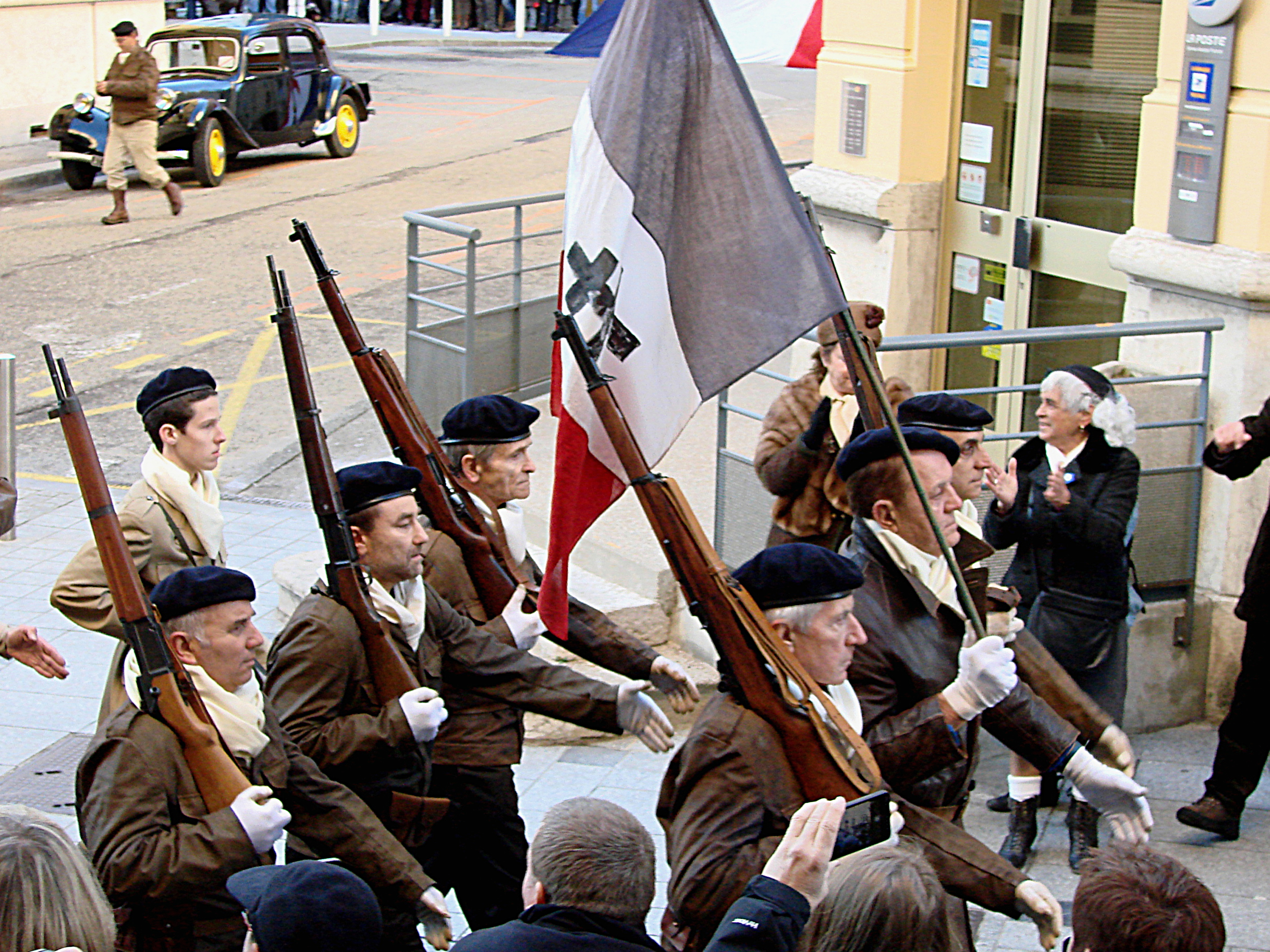 Cérémonie du 70e anniversaire du défilé du 11 novembre 1943 à Oyonnax, le 11 novembre 2013. La garde du drapeau